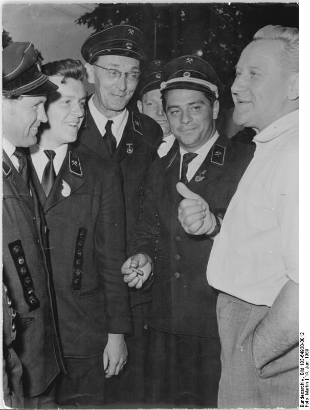 Merseburg, I. Arbeiterfestspiele, Erich Franz Zentralbild Martin Fröhl-L 14.6.59 1. Arbeiterfestspiele in der DDR. Das Festprogramm der IG Bergbau unter dem Motto "Kohle, das ist Licht, Wärme, Leben" gestaltete sich am Samstagabend, dem 13.6.59, auf der Freilichtbühne Merseburg unweit der Braunkohlengruben des Geiseltales zum ersten Höhepunkt der Arbeiterfestspiele. UBz: Schauspieler Erich Franz im Gespräch mit Kumpeln des BKW "Einheit" Bitterfeld.